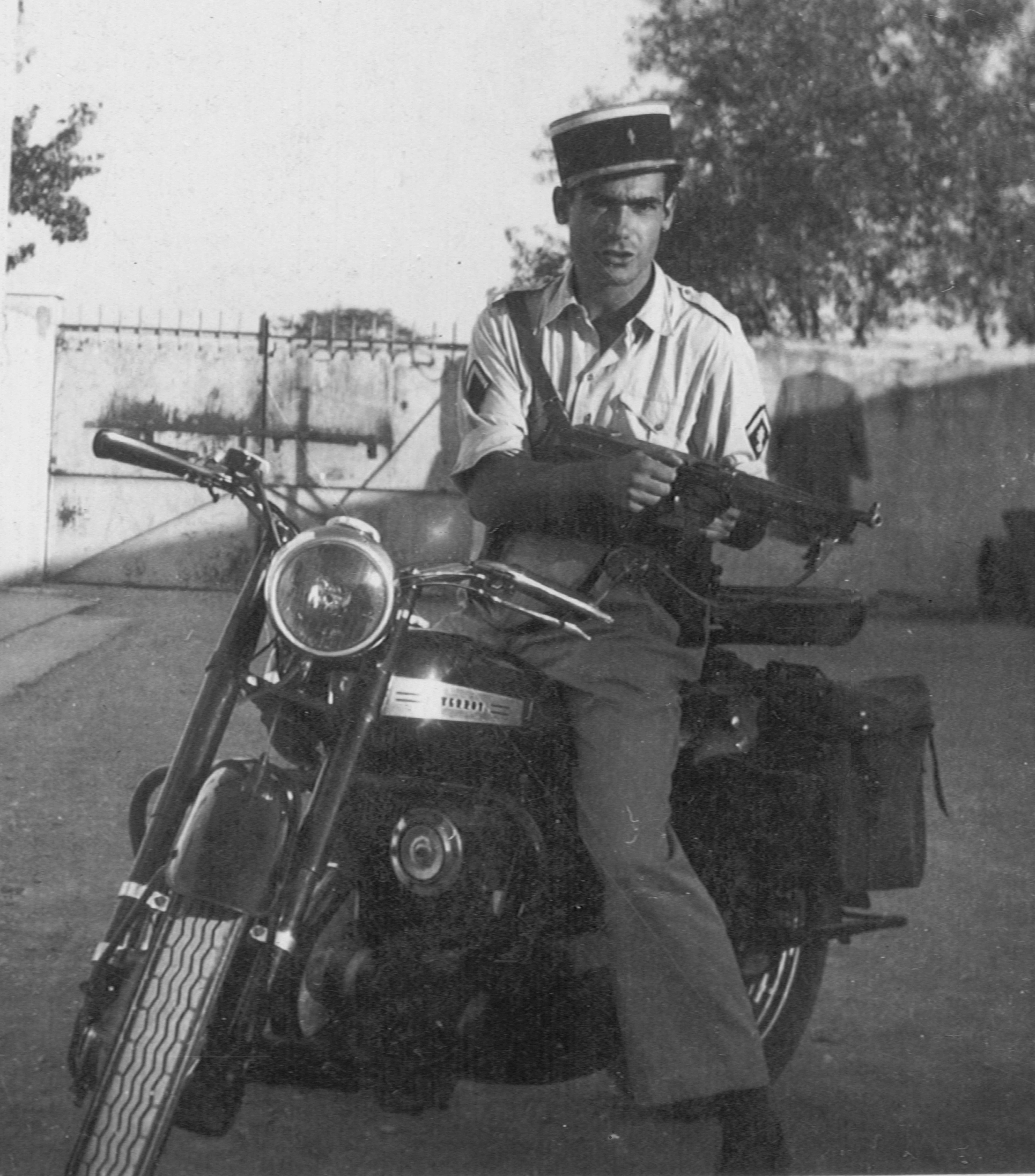 Terrot 500 RGST - Gendarmerie Française - Années 50 - Tunisie